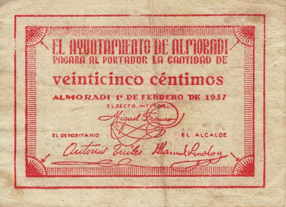 25 céntimos de peseta del Ayuntamiento republicano de Almoradí.